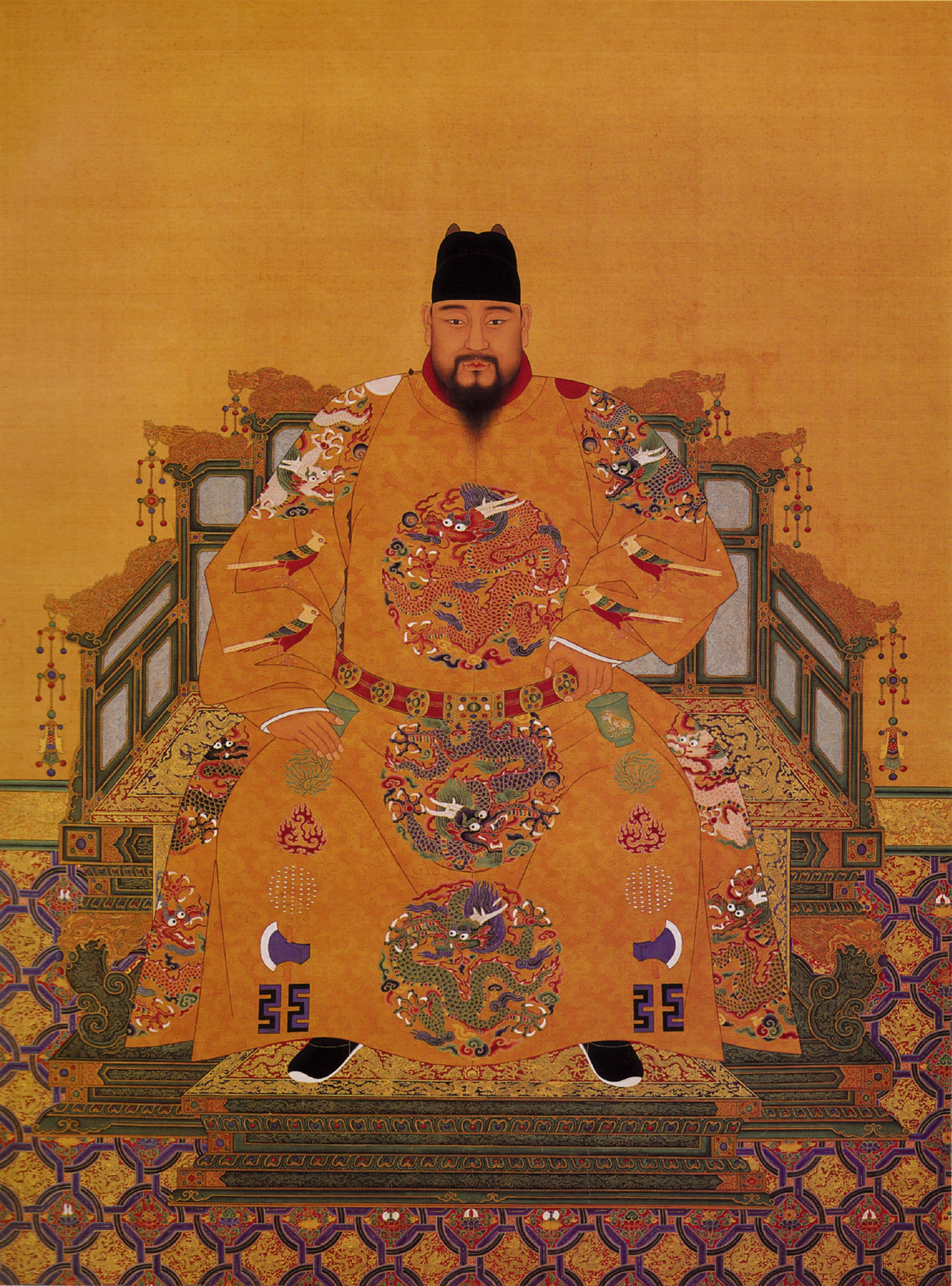 Portrait assis de l'empereur Ming Yingzong